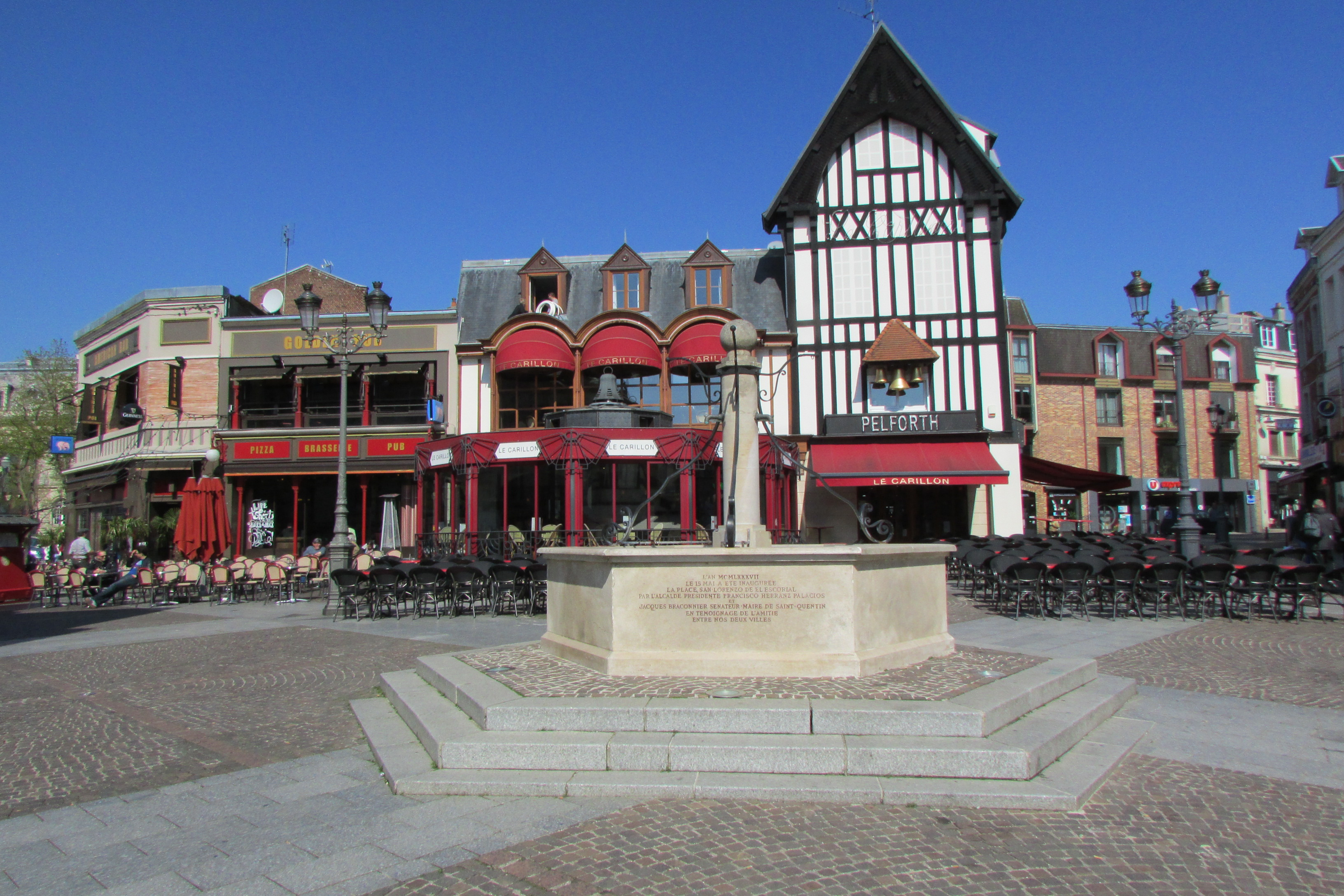 La place San Lorenzo